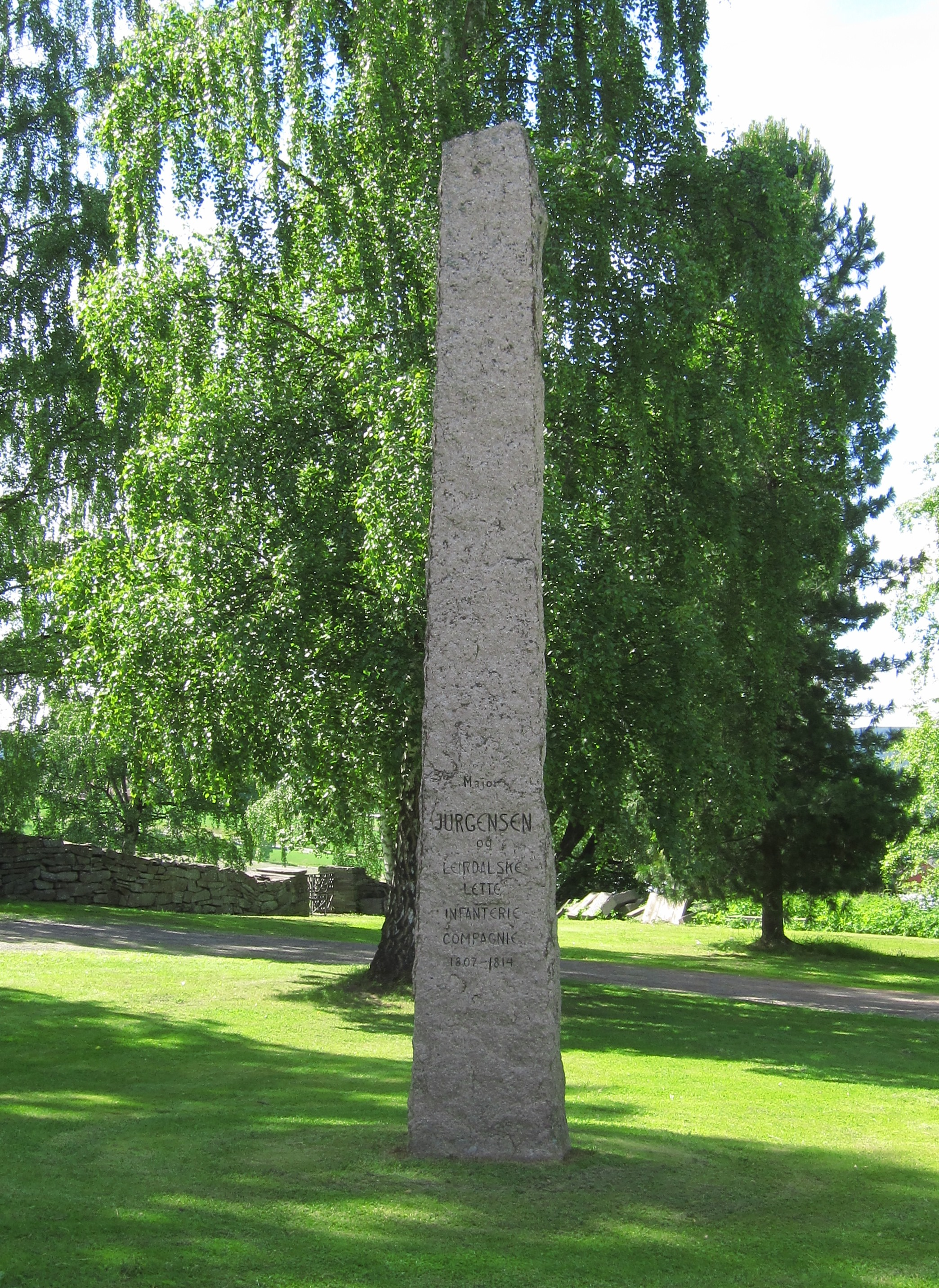 Støtte til minne om major Jurgensen og lærdalske kompani inskripsjon, "Major Jürgensen og Leirdalske lette Infanterie Compagnie 1807-1814".